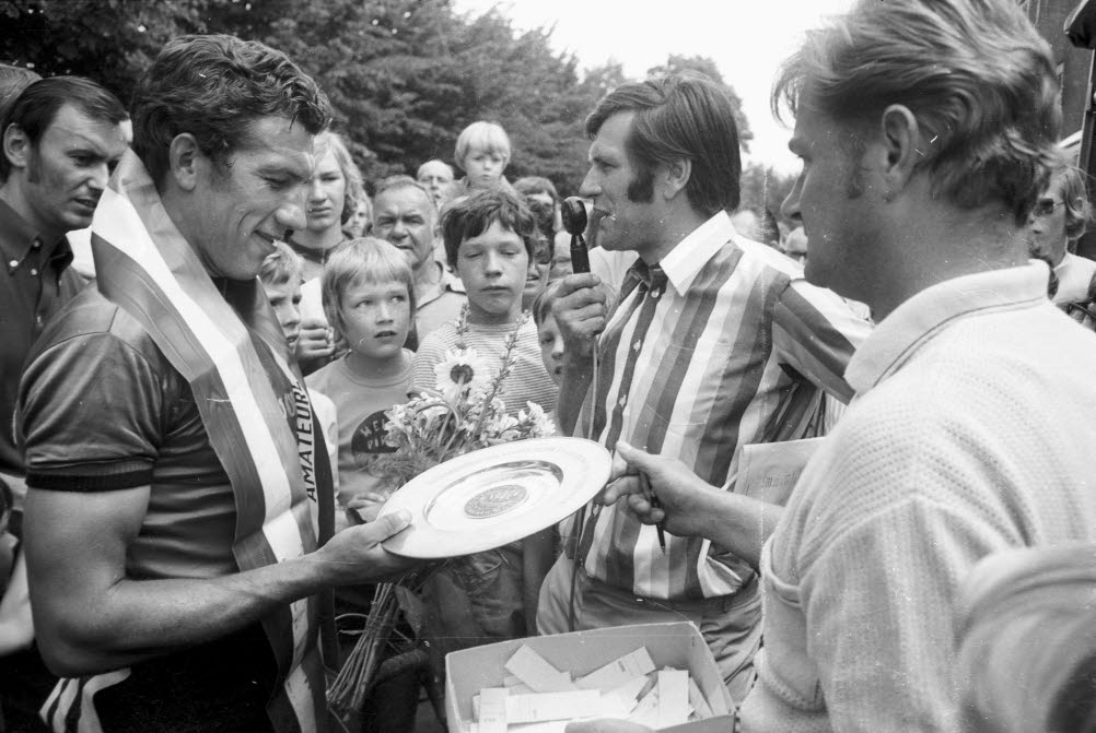 Sieger Manfred Mücke erhält den Siegerteller überreicht.